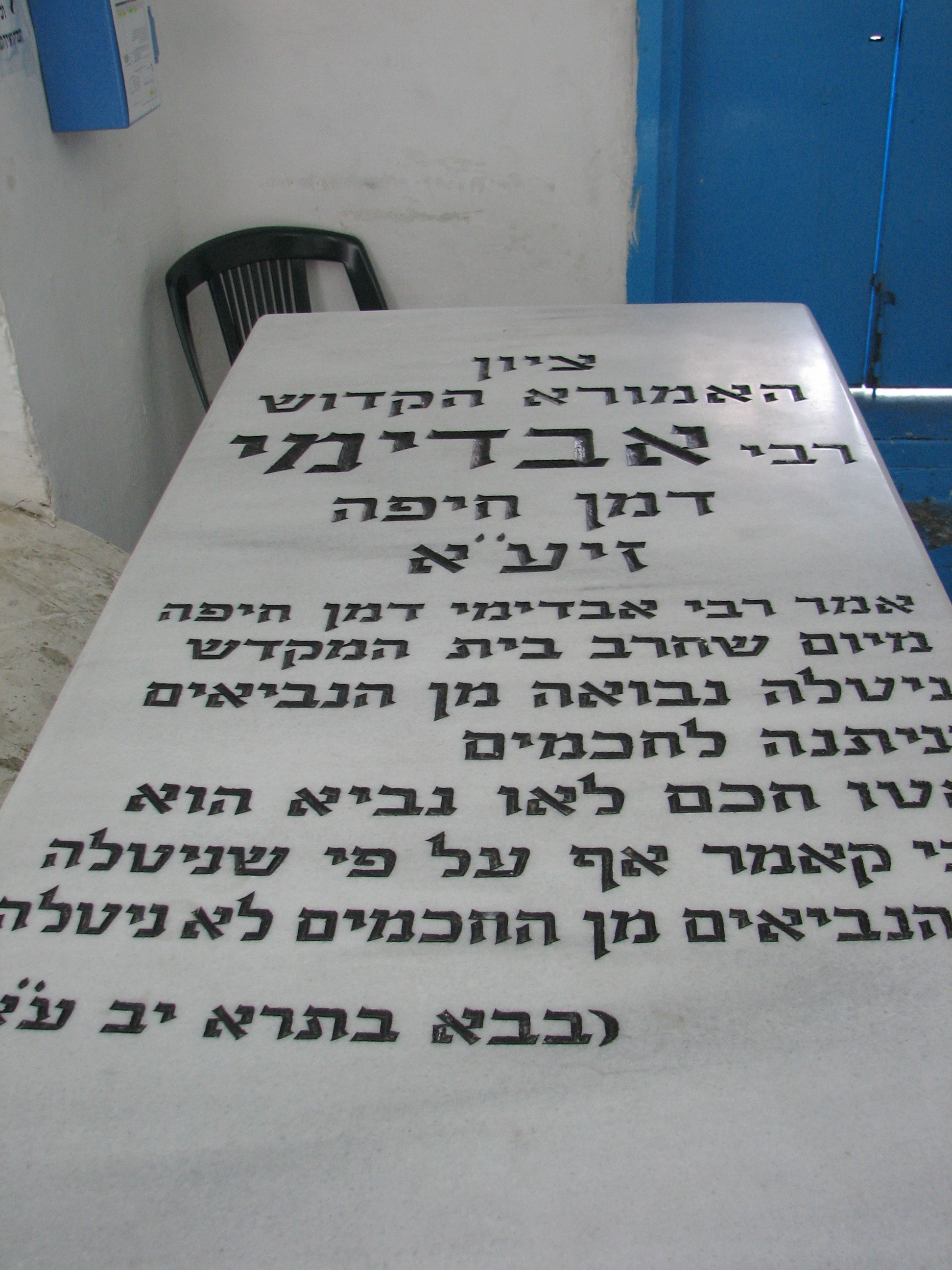 Old Jewish Cemetery in Haifa בית העלמין כנסת ישראל הוא בית העלמין היהודי הישן של העיר חיפה. בית העלמין שוכן בדרך יפו בסמוך לציון קברו של האמורא אבדימי דמן חיפה. Grave of Avdimi dmin הקבר של רבי אבדימי דמן שהיה אמורא בדור השני והשלישי לאמוראי ארץ ישראל